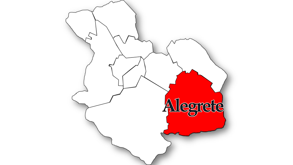 Evolução da População